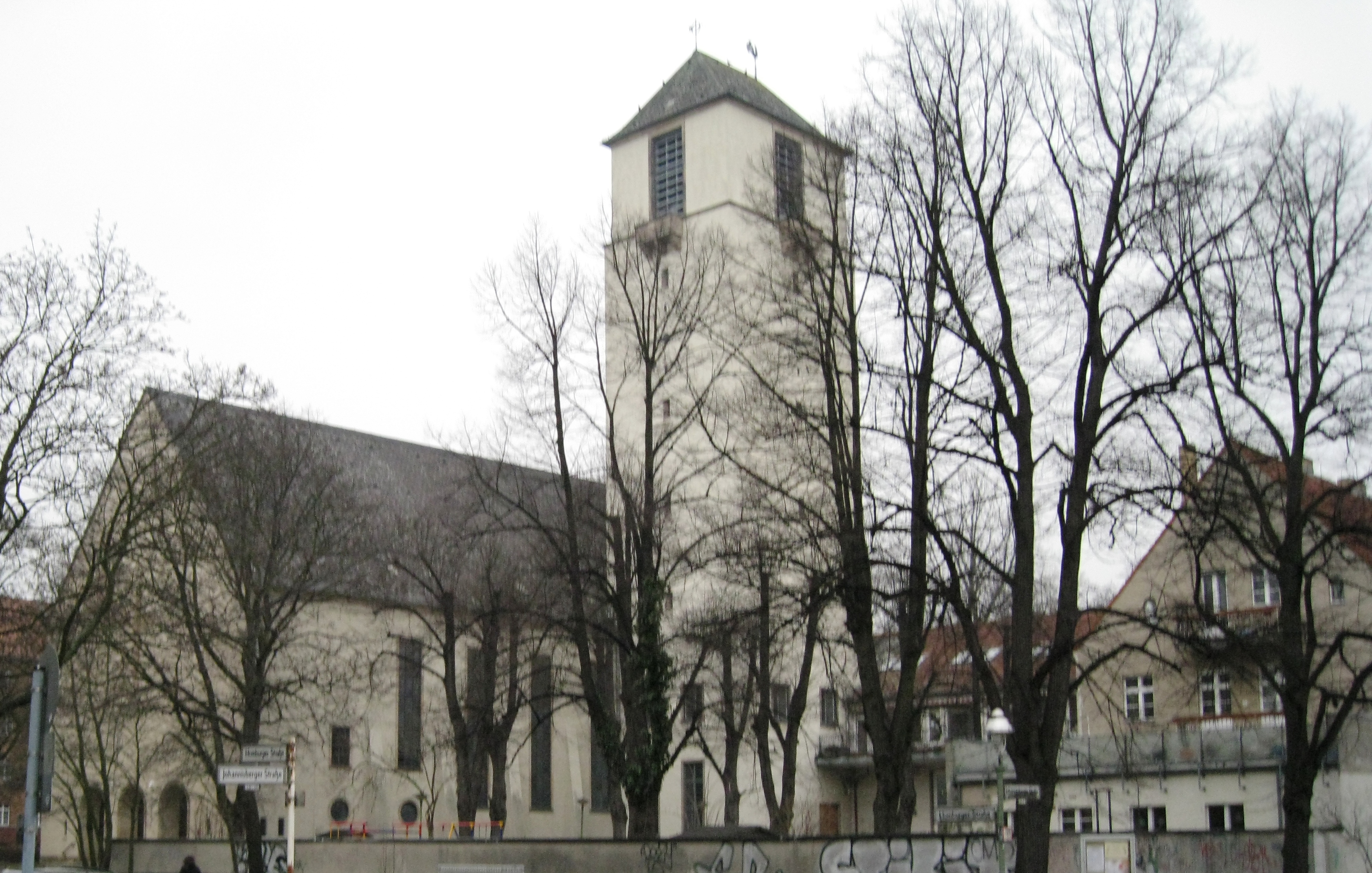 Lindenkirche mit Lindengarten im Vordergrund